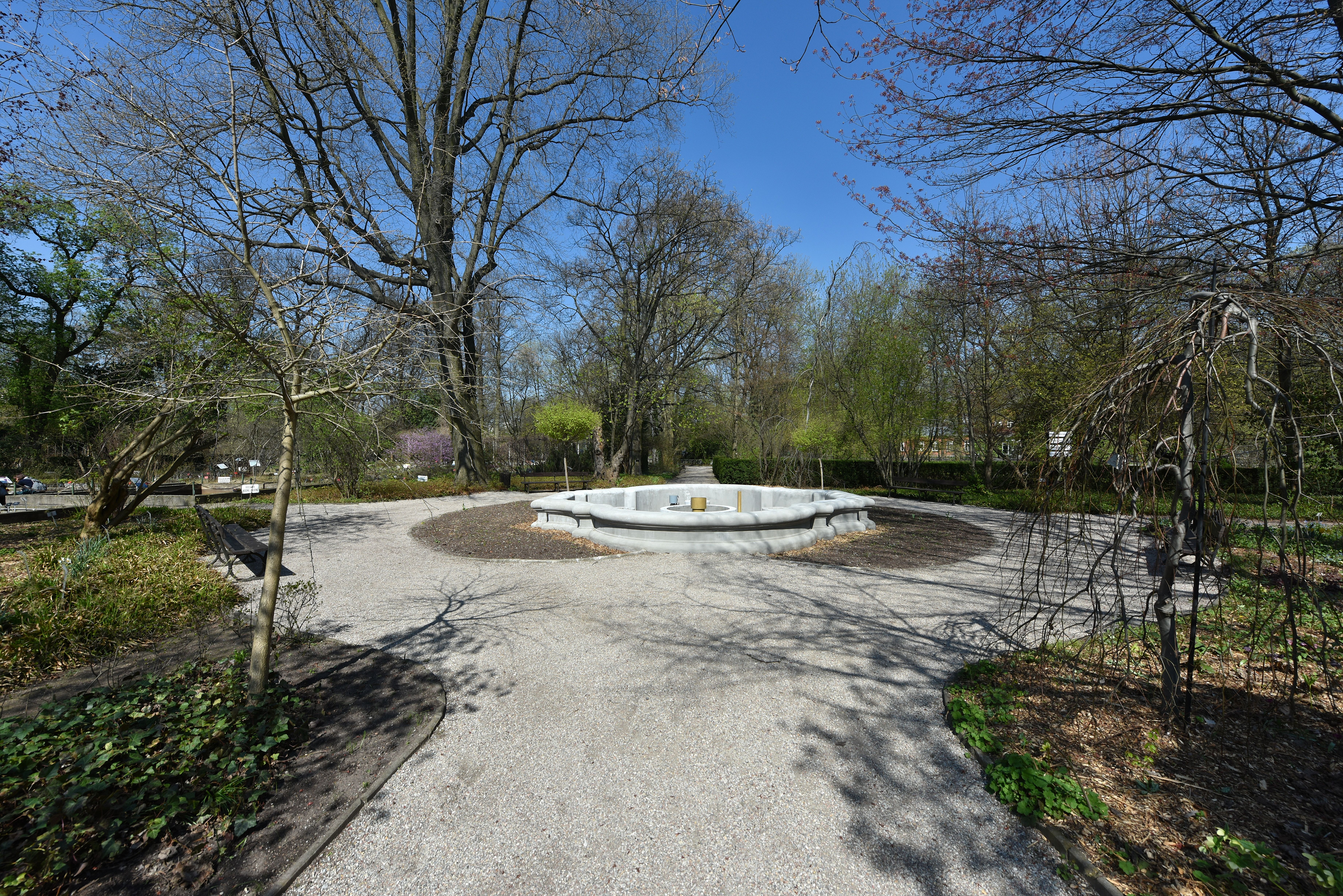 Fontanna w Ogrodzie Botanicznym w Warszawie